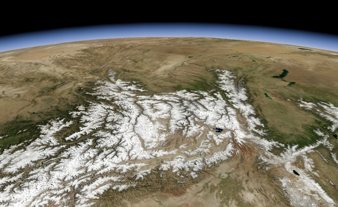 La Cordillère de Kunlun et le Pamir depuis la Chine.